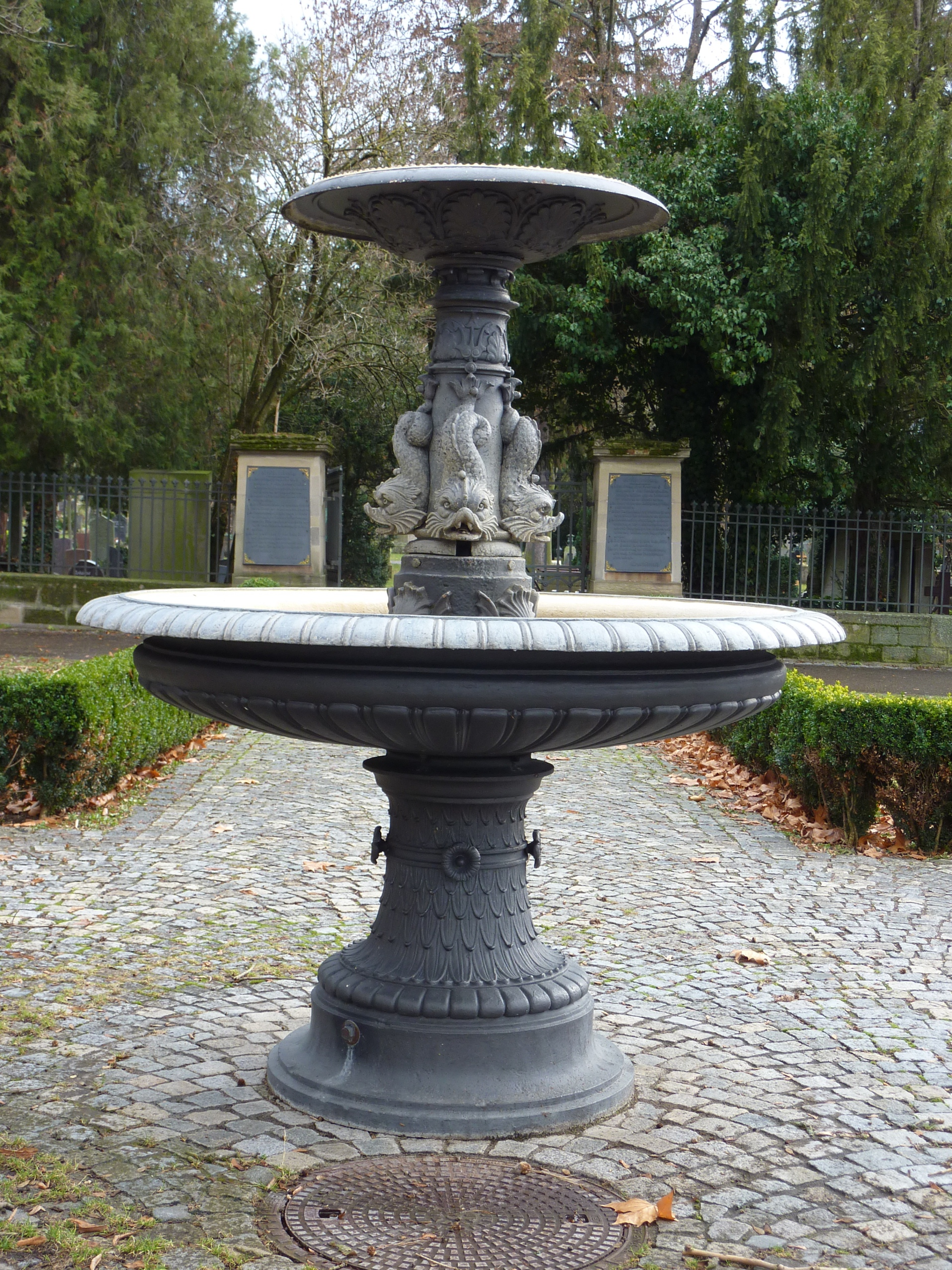 Eiserner Fischbrunnen, Blumenstr., Esslingen